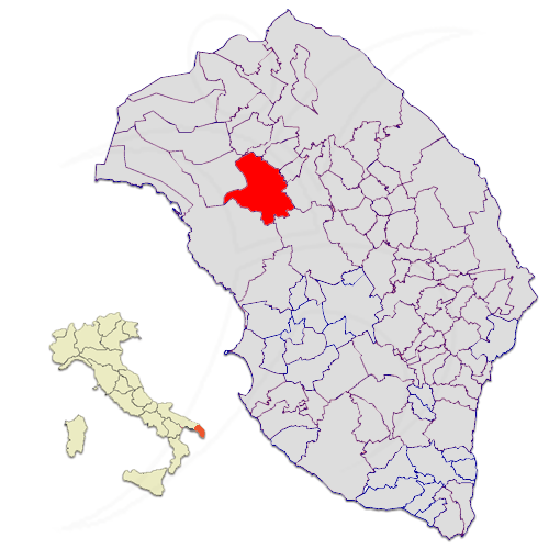 Il territorio del comune di Copertino nella Provincia di Lecce